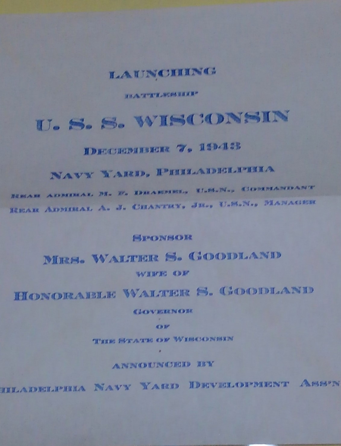 戦艦ウィスコンシンの進水記念プログラム